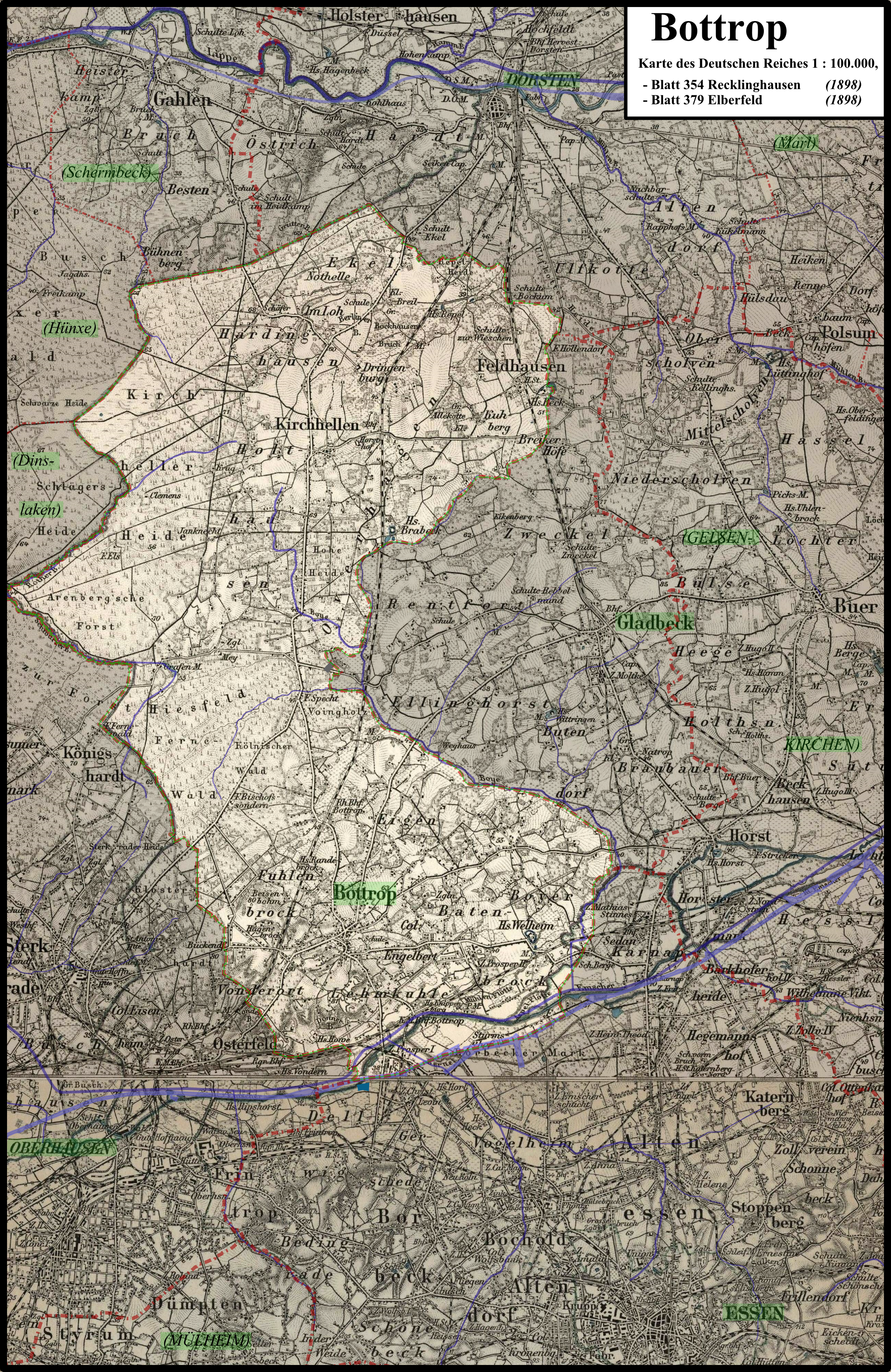 Karte der Stadt Bottrop auf Basis der Karte des Deutschen Reiches| 1 : 100.000, Ende des 19. Jahrhunderts;Verwaltungsgrenzen (rot), Kanäle, Flüsse und Seen entsprechen dem heutigen Stand/Verlauf; heutige Stadtnamen sind hellgrün hervorgehoben (damalige Stadtnamen in Großbuchstaben), aufgehellt und hellgrün umgrenzt ist die heutige Stadt Bottrop.